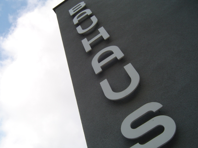 Logo for Bauhausskolen i Tyskland.